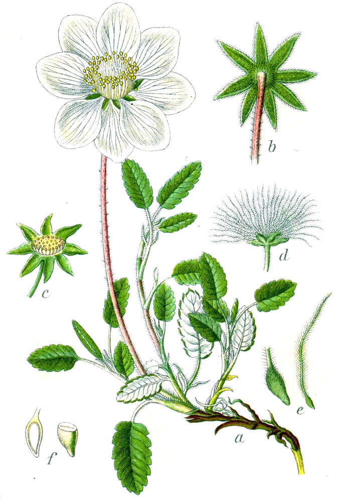 Dryas octopetala L., syn. Geum octopetalum E.H.L.Krause Original Caption Dryade, Geum octopetalum